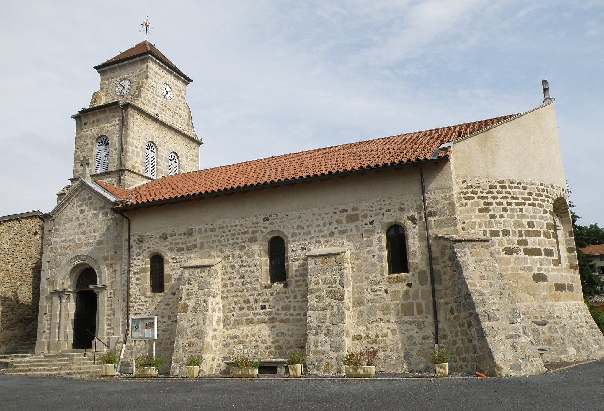 Félines (dép. de la Haute-Loire, Auvergne), France. Eglise, flanc sud.